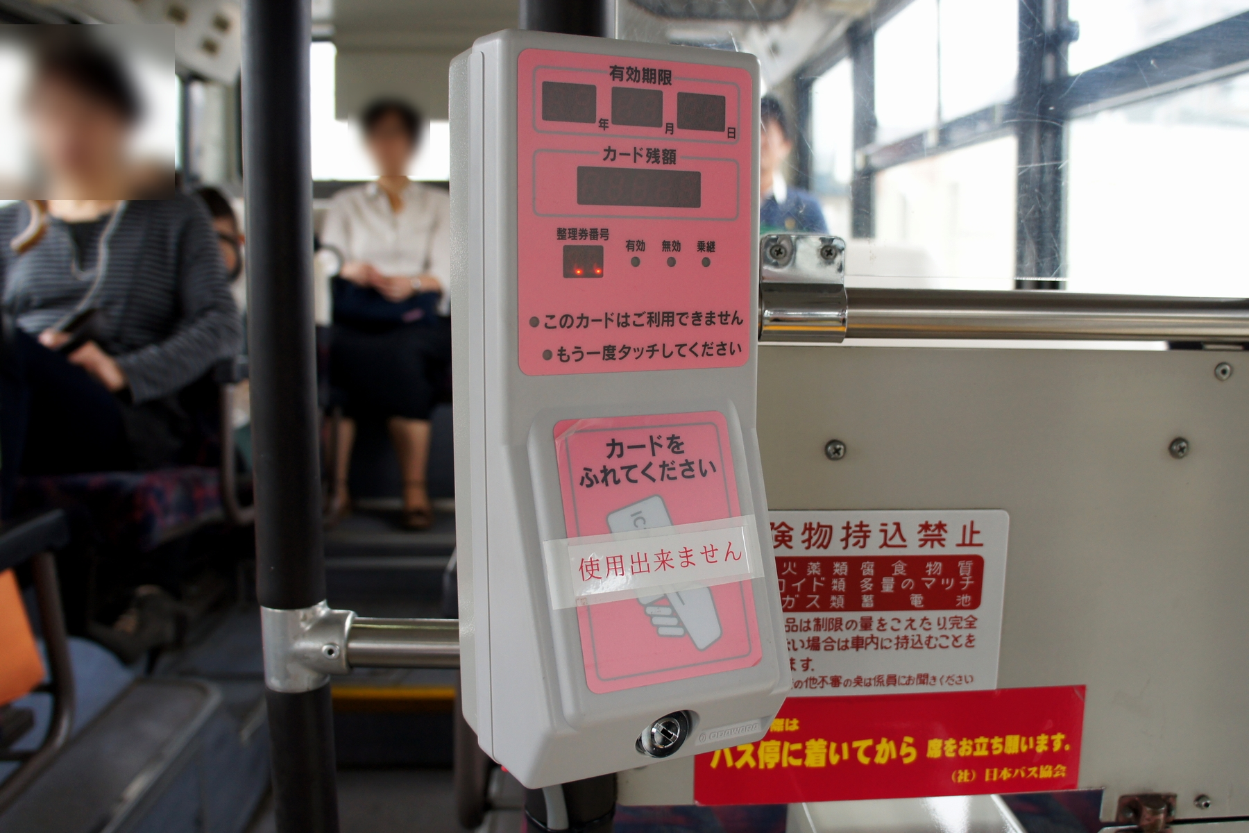 旭川電気軌道のバスに搭載されているAsacaリーダー。